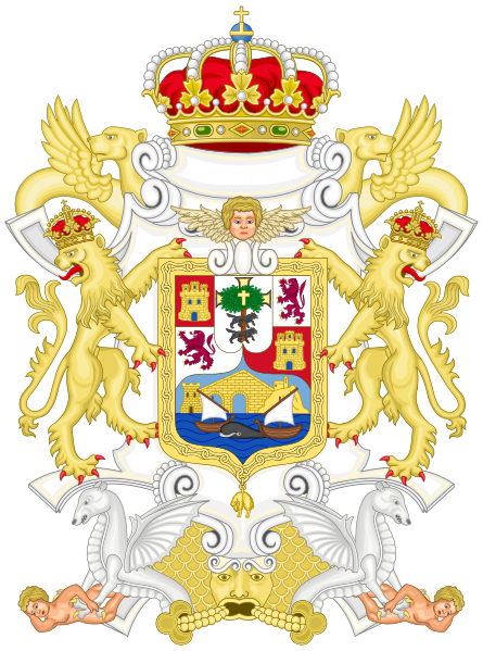 Escudo de Castro Urdiales. Oficial por real cédula de Felipe V el 23 de Marzo de 1745.